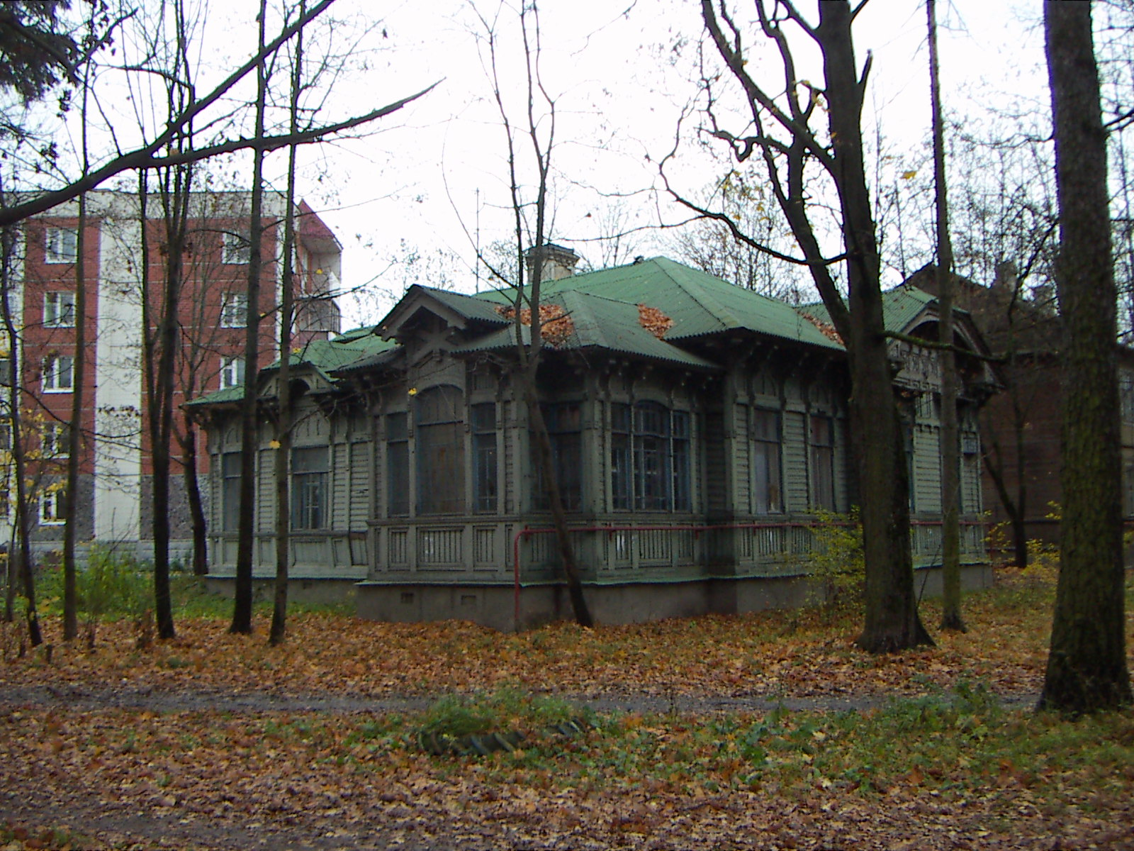 Деревянный жилой дом в Гатчине (ул. Карла Маркса, д. 15)